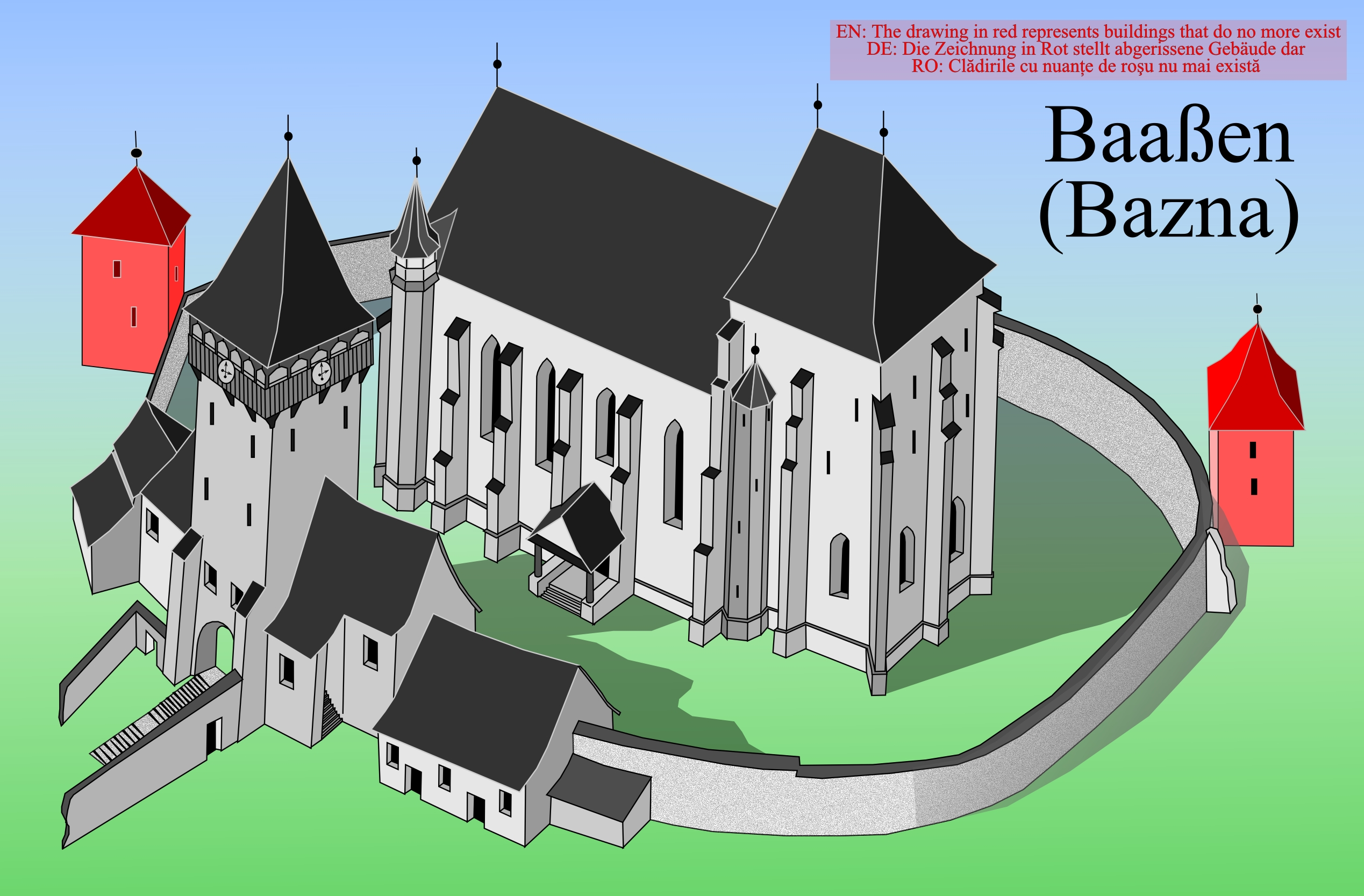 Biserica fortificata din Bazna